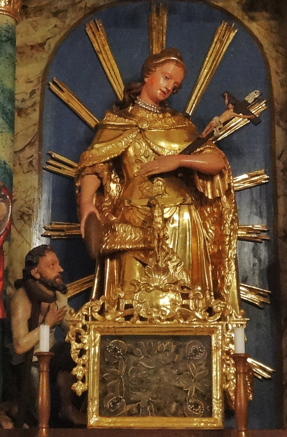 Statue der hl. Hildegard, Hildegard-Altar der Pfarrkirche Hl. Laurentius Dieses Bild wurde anlässlich des österreichischen Tags des Denkmals 2013 in Kärnten eingereicht.